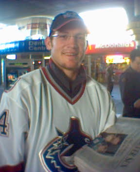 Matt Cooke